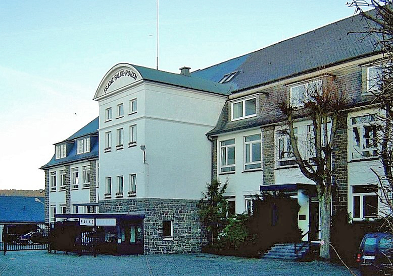 Falke (Unternehmen) in Schmallenberg, Germany.